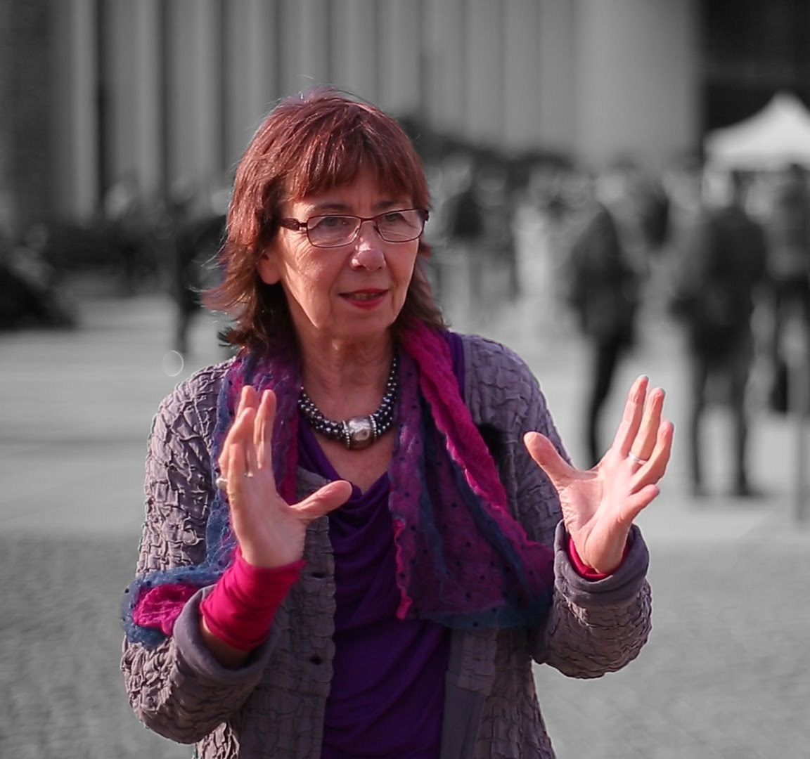 Schulen brauchen mehr Mut zur Veränderung: Margret Rasfeld, Schulleiterin und Mitbegründerin der Initiative "Schule im Aufbruch", erklärt, wie es geht: den ...